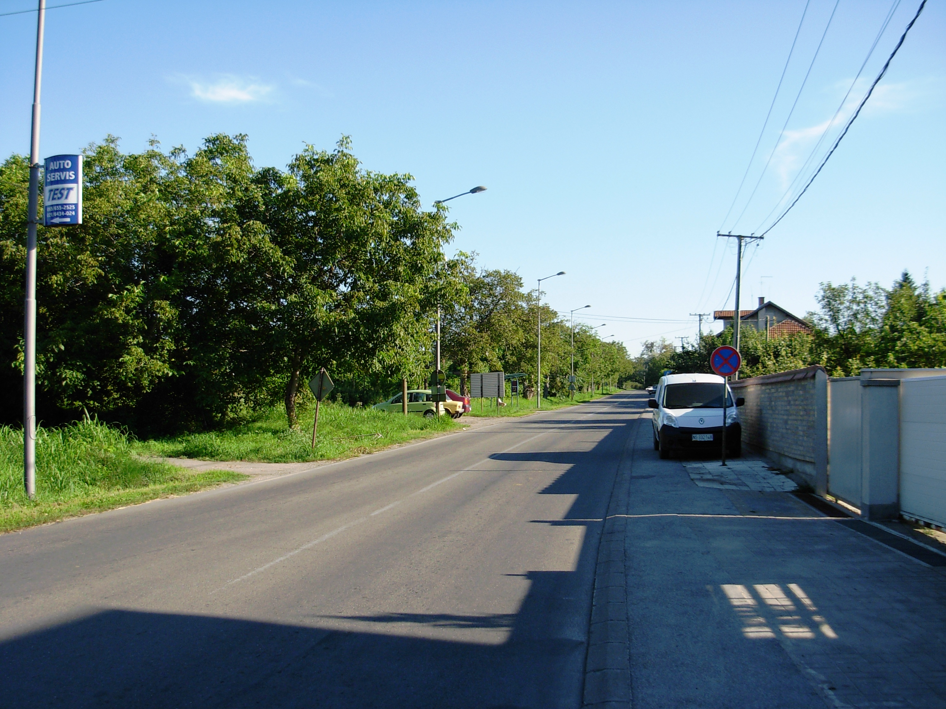 Kamenički put, Trandžament, Petrovaradin.